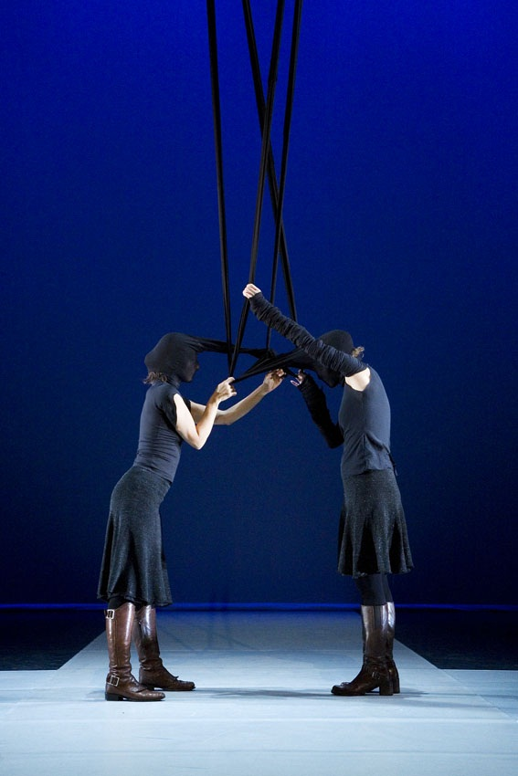 עלית קרייז ואנטון מירטו במיצג Tights